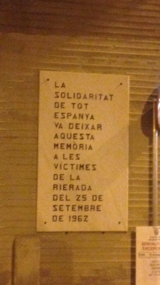 Placa conmemorativa riadas de 1962 en Rubí